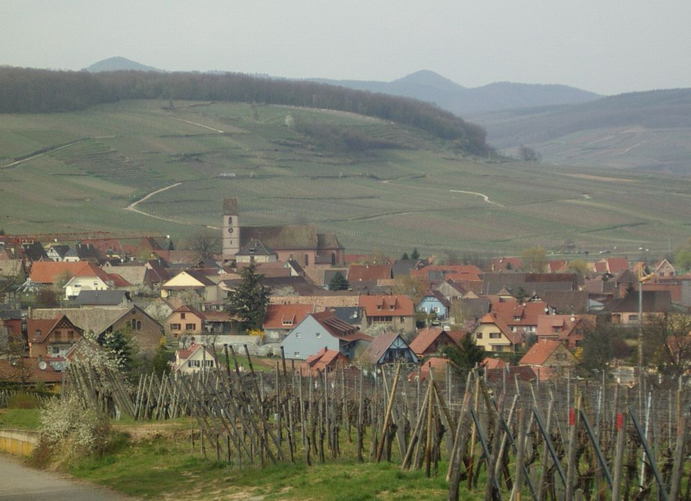 Orschwihr, Haut-Rhin (France) Author: Rémi Stosskopf Date: 8 april 2006